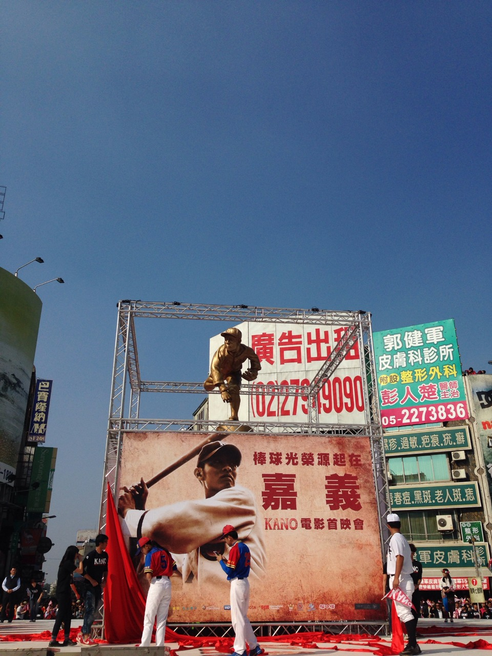 電影《KANO》於2014年2月22日在嘉義首映，當天除了封街遊行外，並為吳明捷的銅像舉行揭幕儀式。